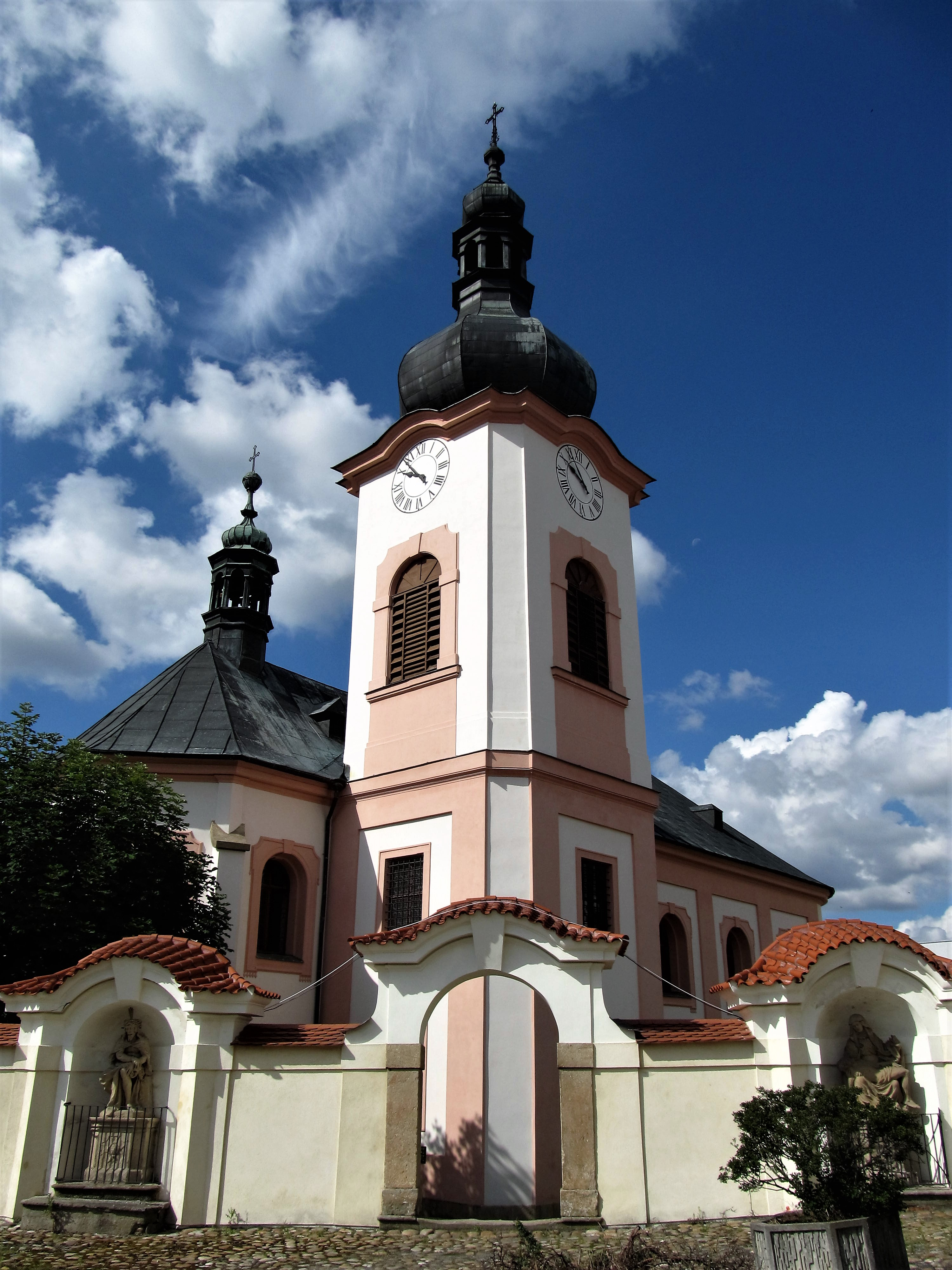 Kostel sv. Jana Křtitele pohledem od zámku